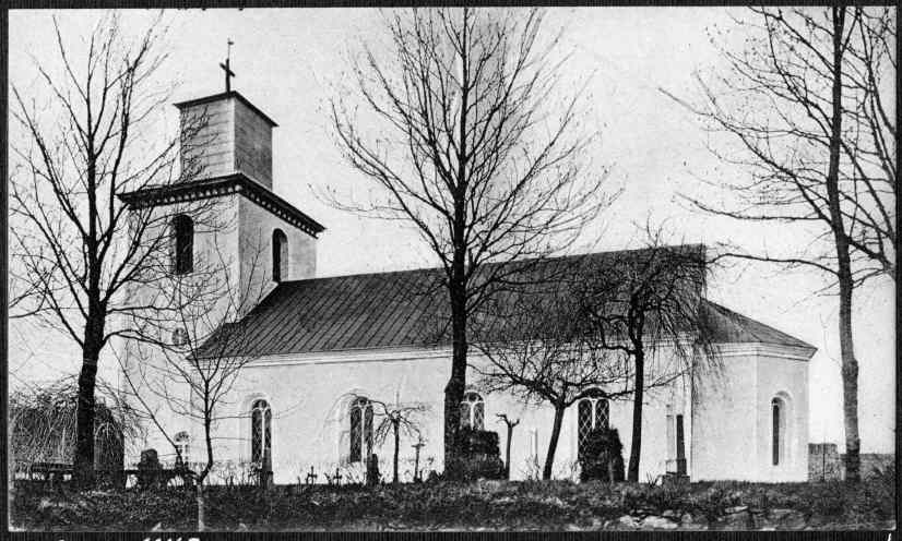 Kyrkan från söder. Kategori: (01) ExteriörerKyrkan från söder.